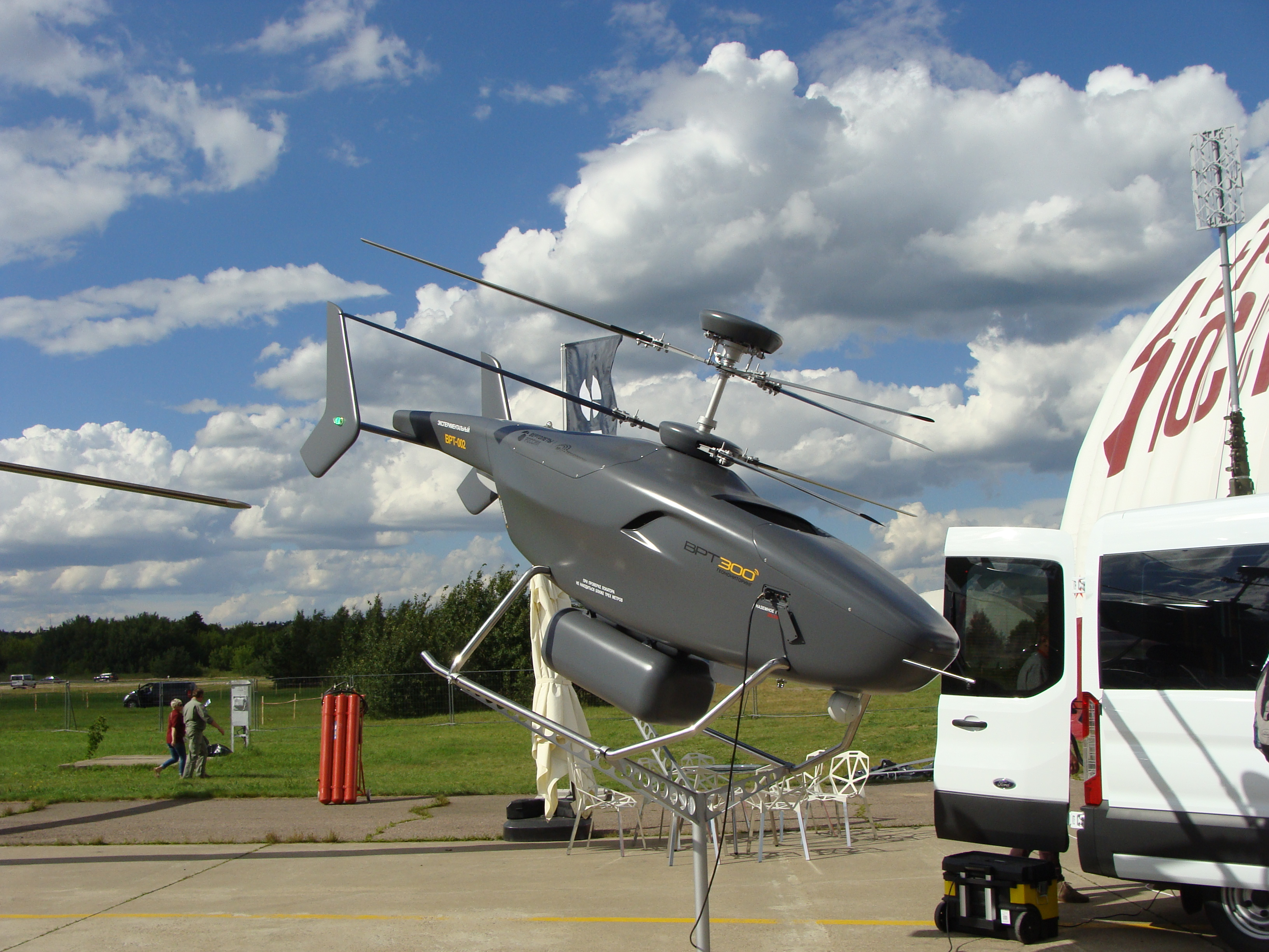 ВРТ 300 на авиасалоне МАКС 2017.